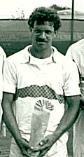 Braasch im Stör-Pokal 1987